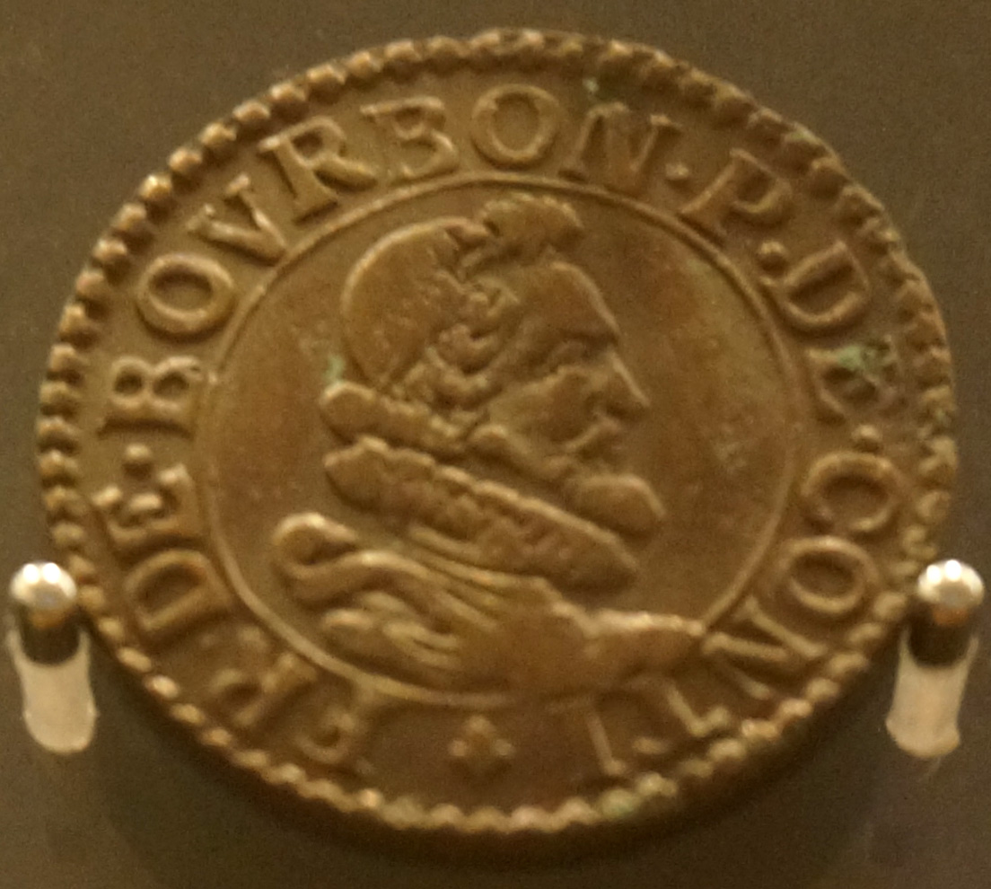 Monnaie de Château-Regnault au musée de l'ardenne.